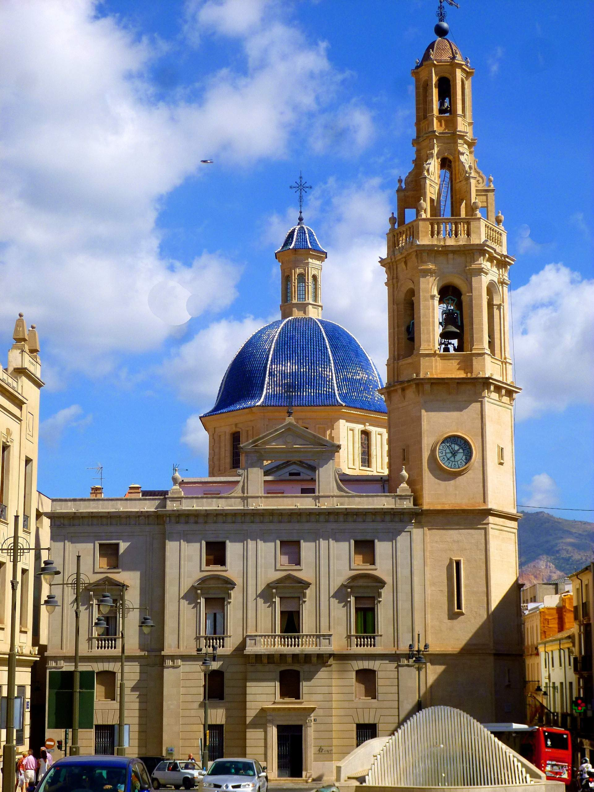 Alcoy - Iglesia Arciprestal de Santa María